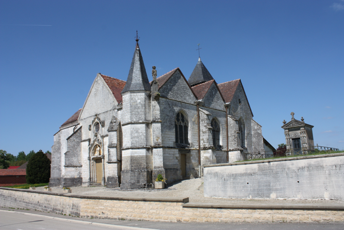 Église Saint-Eusèbe de Chapelaine (Classé) .